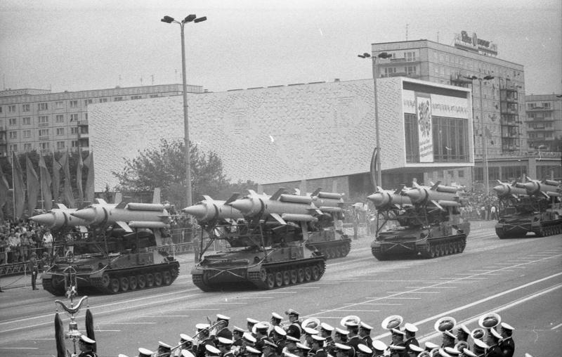 ADN-ZB / Oberst / 7.10.88 Berlin: Jahrestag-Ehrenparade Die Ehrenparade der NVA fand anlässlich des 39. Jahrestages der DDR in der Karl-Marx-Allee statt. Entlang der Paradestrecke waren u.a. Zwillings-Fla-Raketen zu sehen.